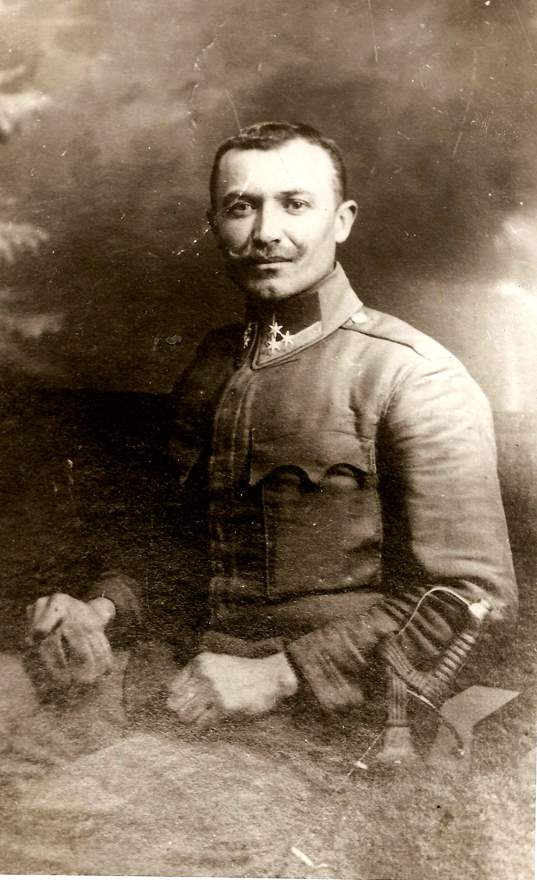 Ioan Doican îmbrăcat militar. Era cunoscut în sat ca "maistăr" zidar şi bărdaş, ca primar în anii:1922, 1924, 1938 şi 1941. A scris memorii de război „Notes”, o selecţie privind primul război mondial fiind publicată în lucrarea lui Cornel Lupea Racoviţa - Monografia unei străvechi aşezări sibiene, 1995. Sursa: Monografia Racoviţei, Cornel Lupea.